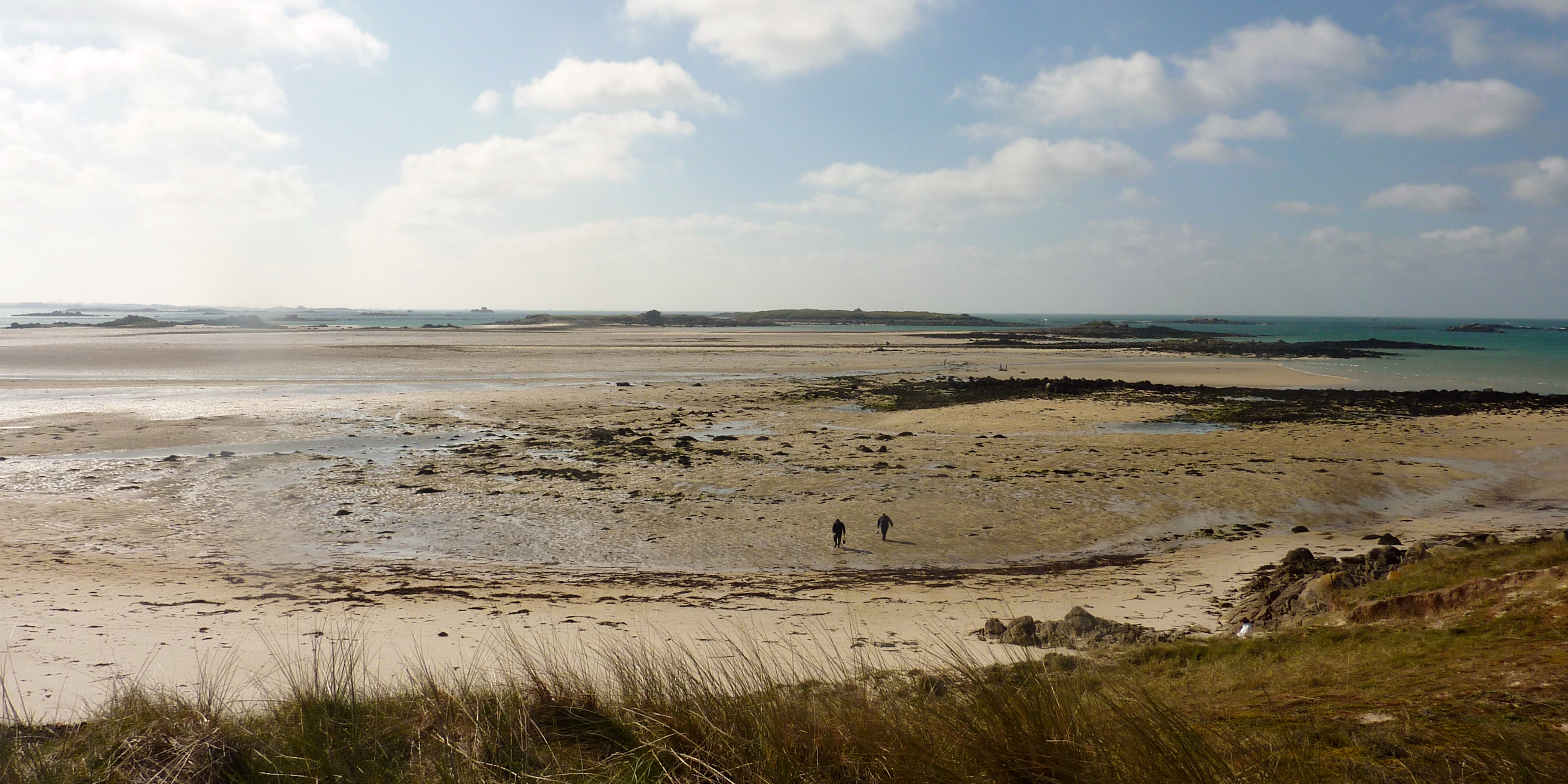 Landéda : les îles Tariec et Guénioc vues de la presqu'île de Sainte-Marguerite ( à marée basse)